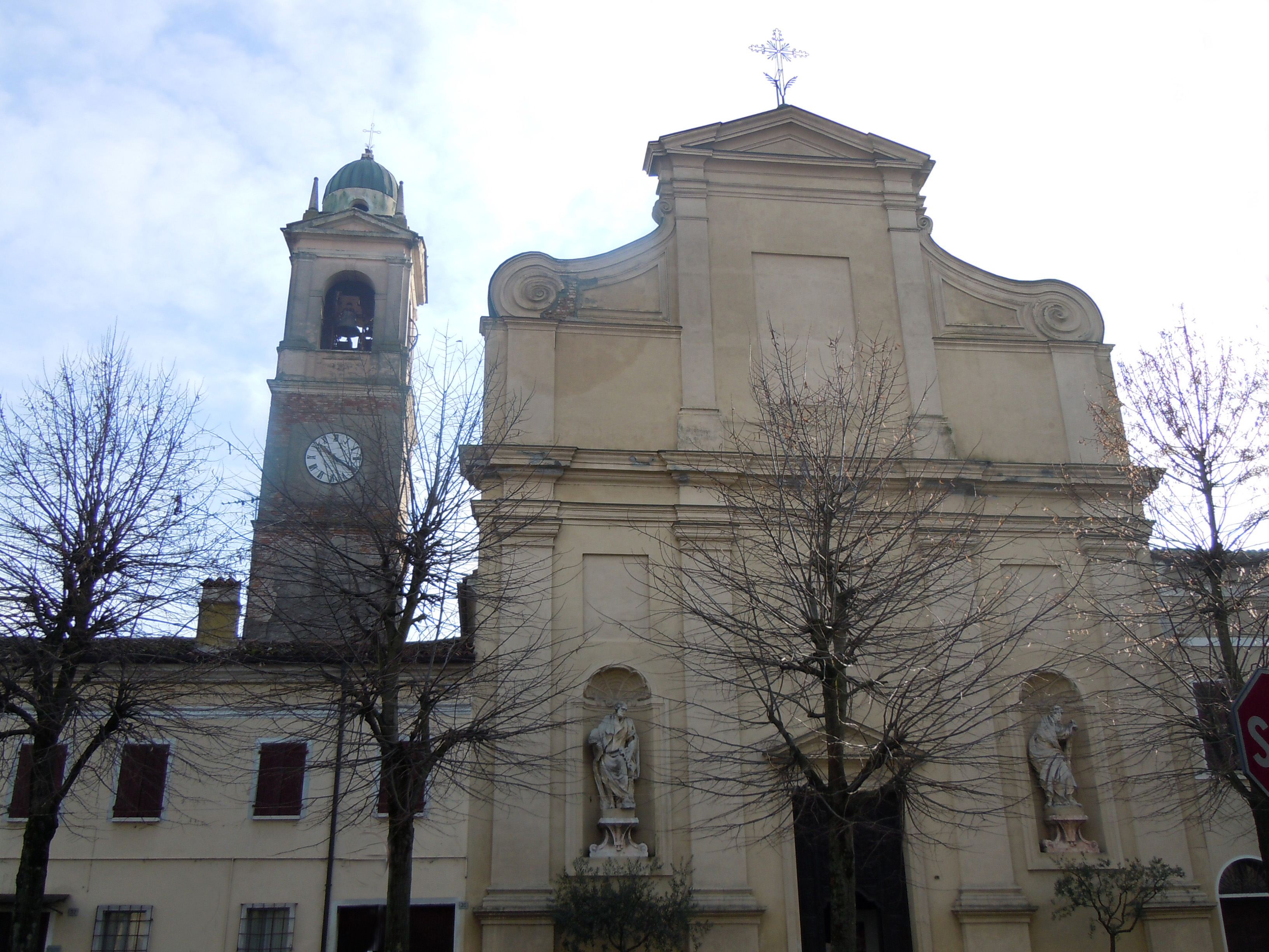 Marcaria, chiesa parrocchiale.